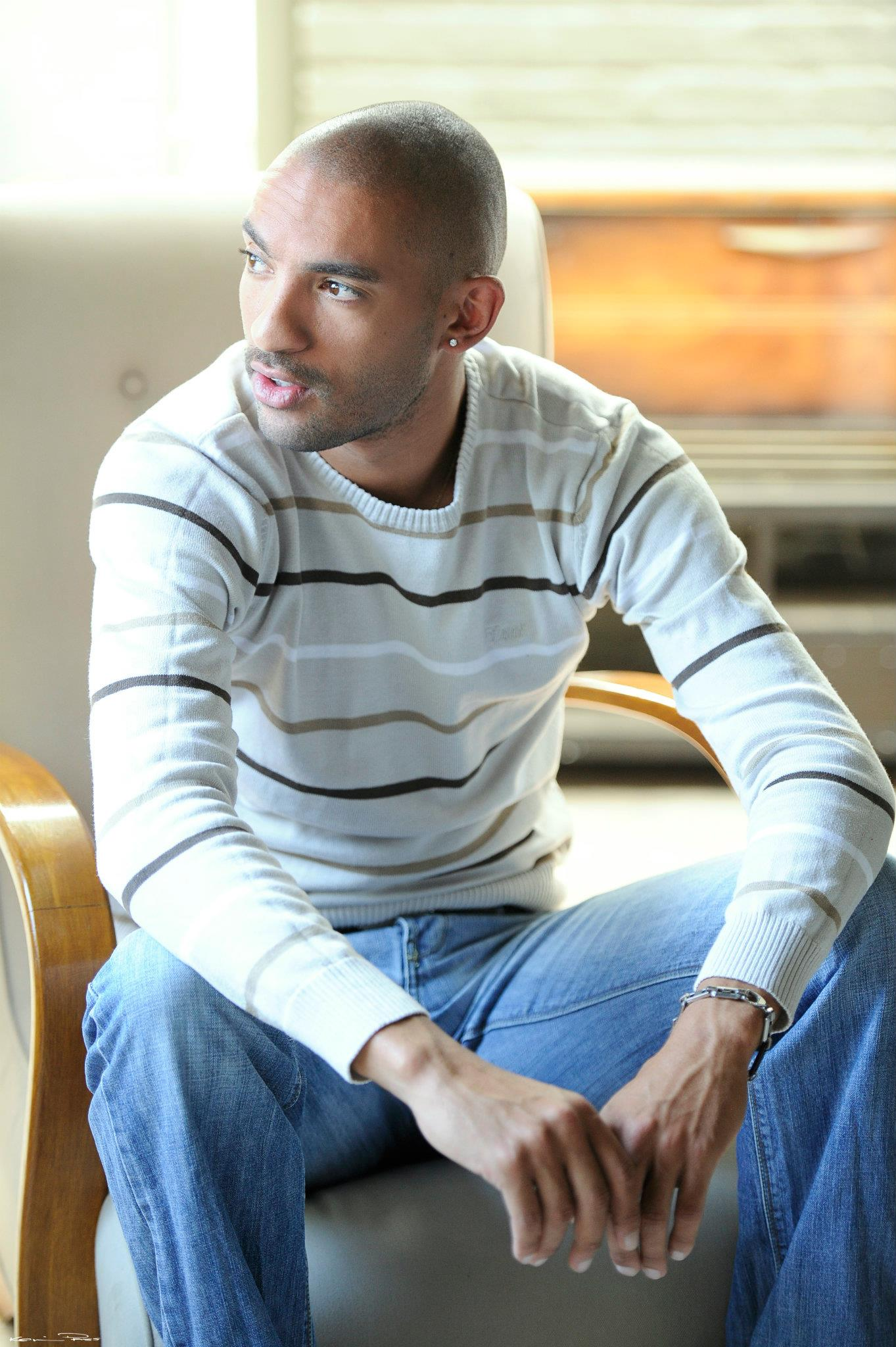 photo shoot